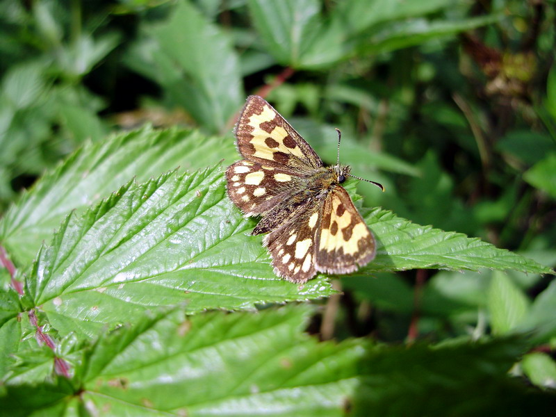 Carterocephalus silvicola. Veseluvka, Jonava district, Lithuania.